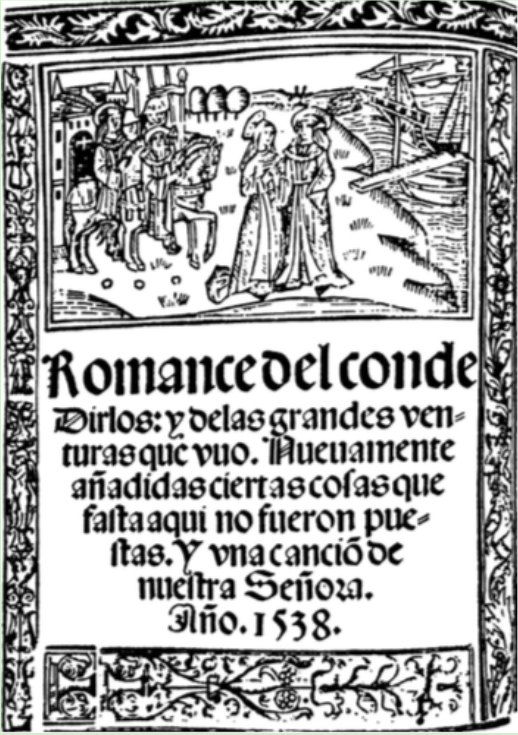 Grabado de la portada de uno de los pliegos sueltos publicados entre 1506 y 1510 en el que se narra el romance del conde Dirlos.